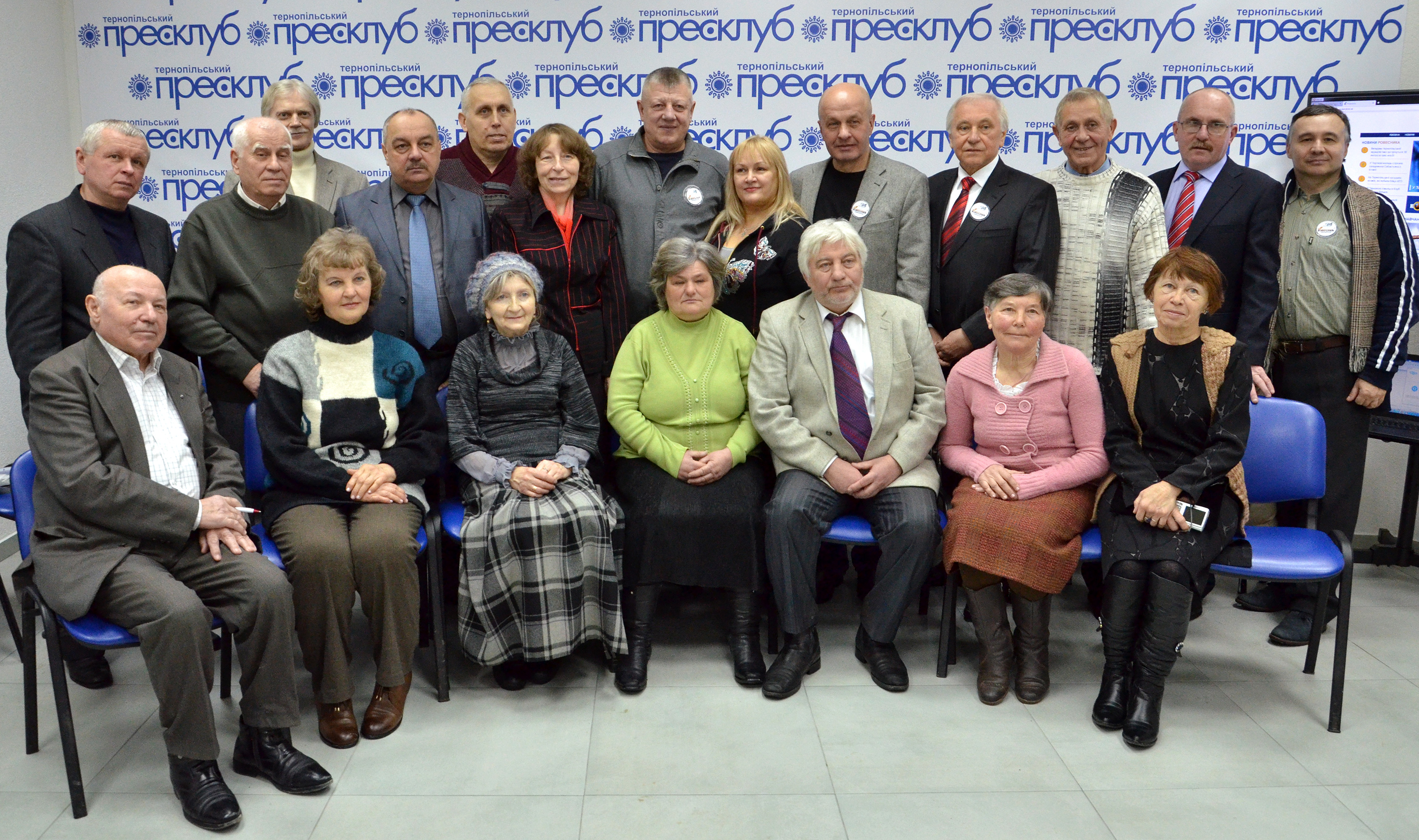 Зустріч журналістів-ветеранів газети «Ровесник» у Тернопільському прес-клубі. Зліва направо: сидять — Михайло Ониськів, Надія Моховик, Надія Шийка, Ярослава Боднарчук, Володимир Андріїшин, Людмила Янчук, Зоя Зацепанюк; стоять — Степан Костюк, Михайло Іващук, Сергій Сірий, Василь Томин, Микола Шот, Лариса Шумило, Микола Мартинчук, Світлана Мичко, Василь Теремко, Степан Слюзар, Богдан Гарасимчук, Михайло Лисевич і Олег ?.